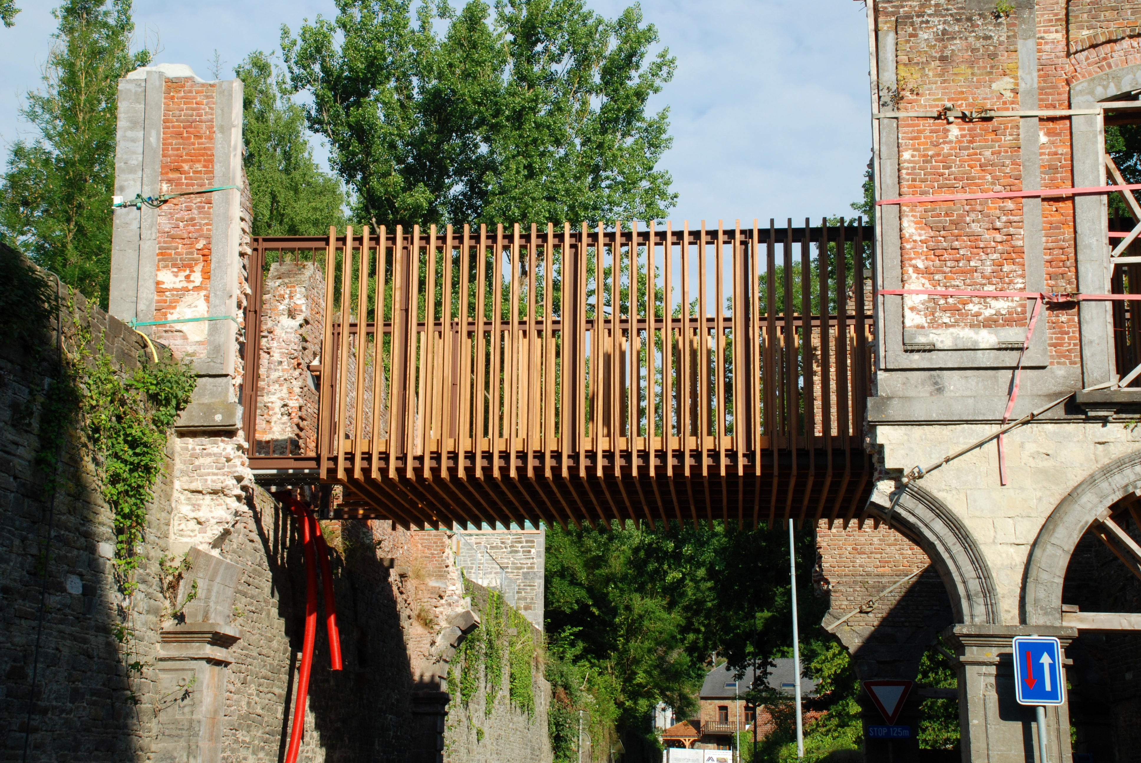 Belgique - Brabant wallon - Villers-la-Ville - ancienne pharmacie de l'Abbaye (passerelle posée en juin 2015)